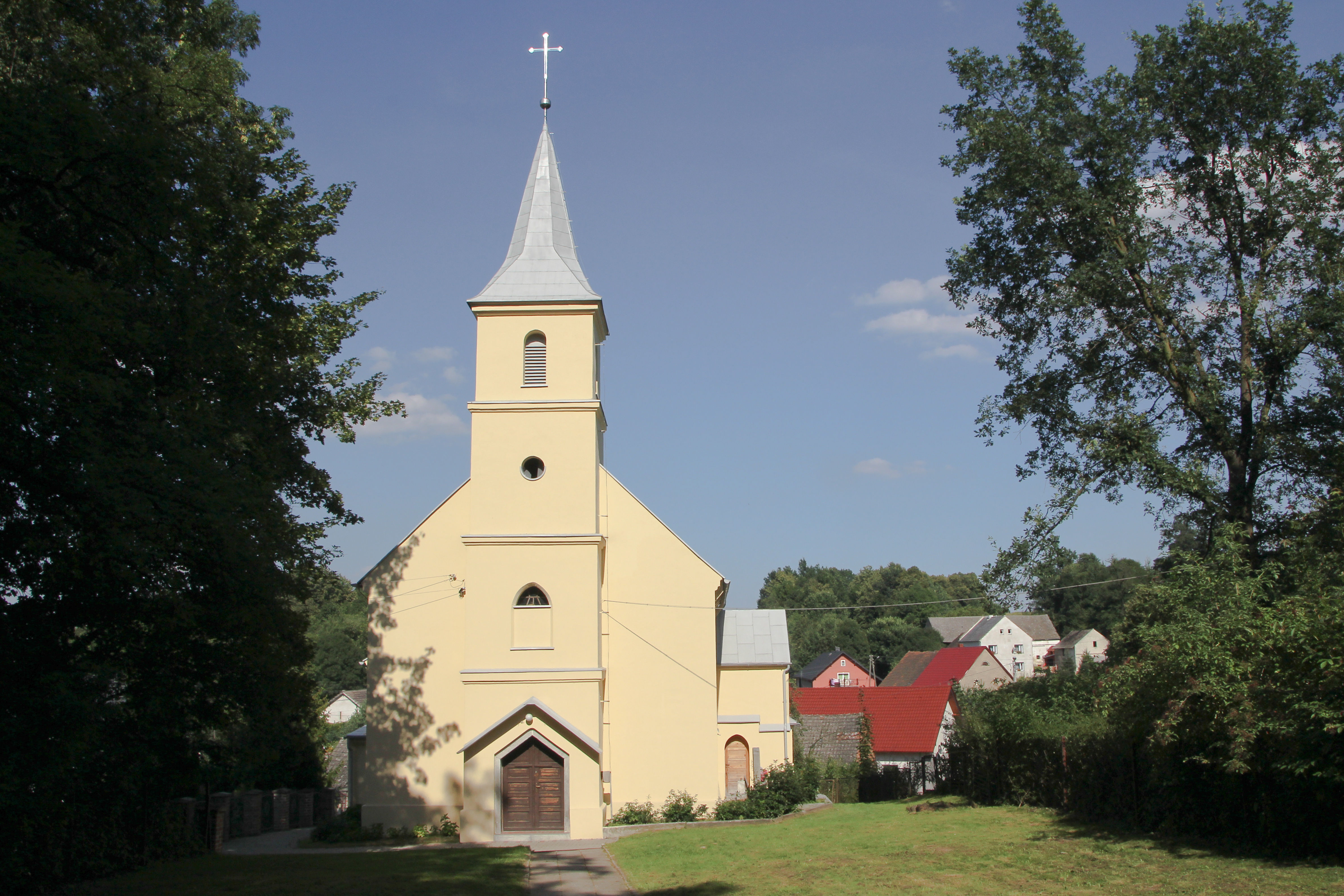 Piorunkowice – wieś w Polsce położona w województwie opolskim, w powiecie prudnickim, w gminie Prudnik.